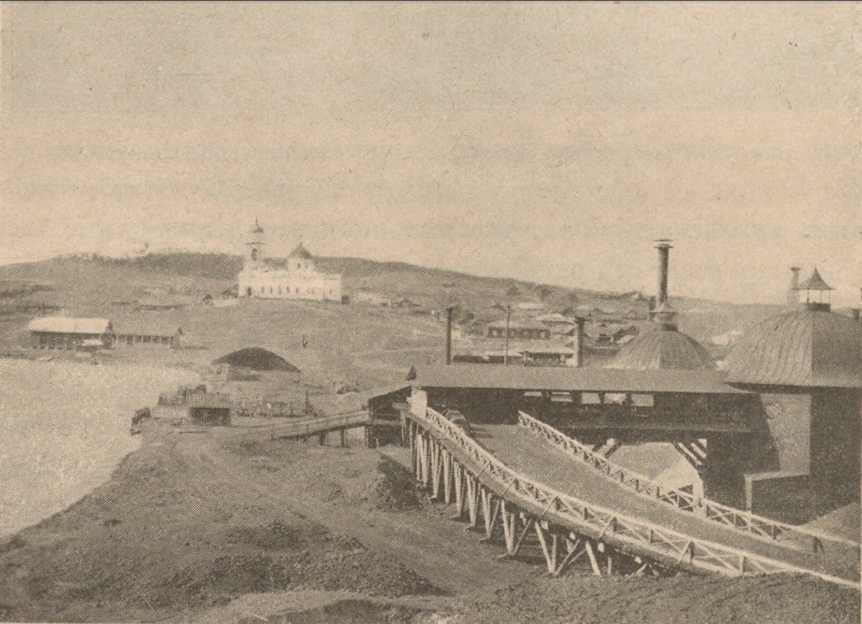 Северский Железоделательный Завод. Вид на заводские эстакады.